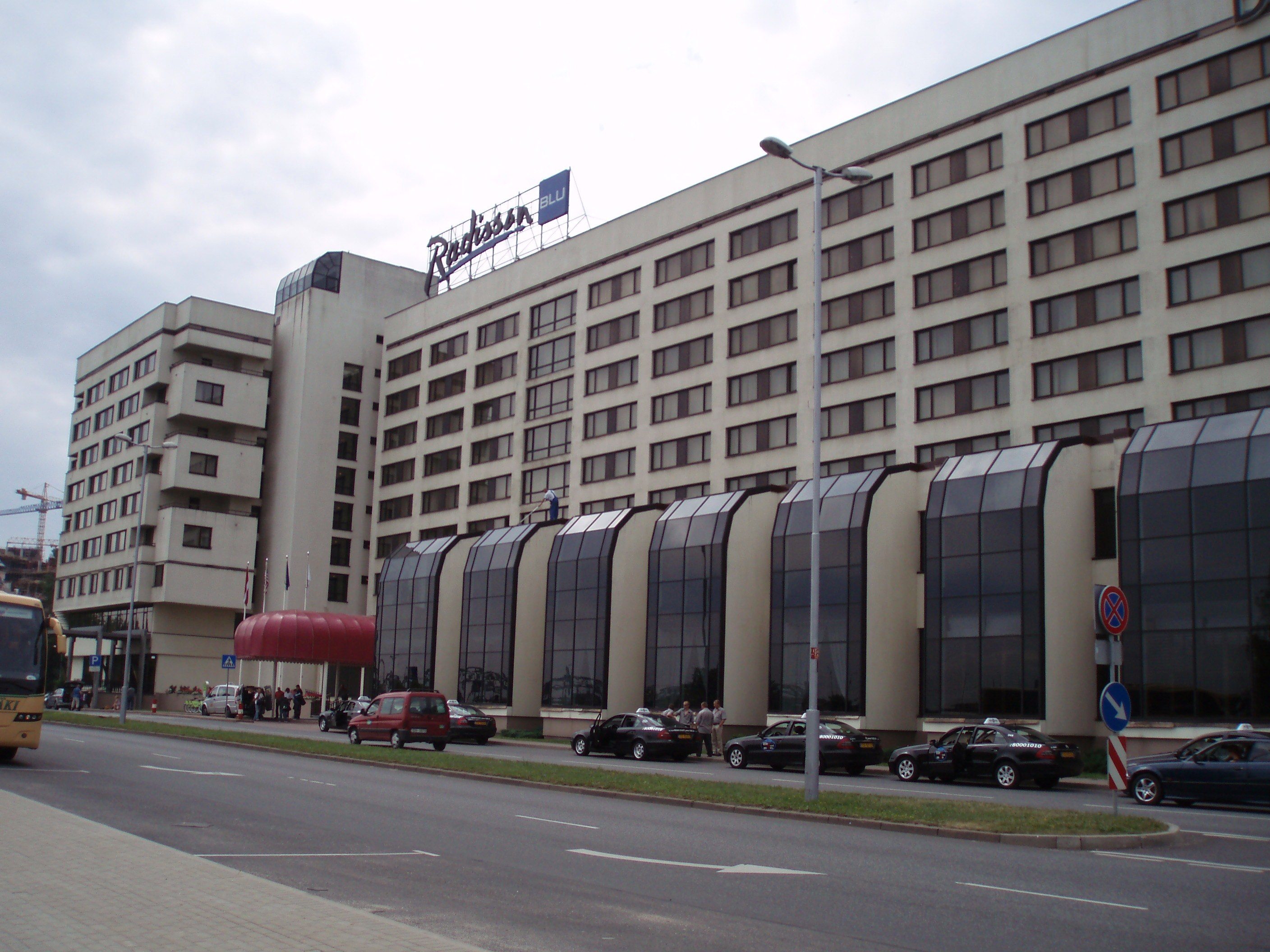 Riga Latvia 605 Radisson Blu daugava Hotel